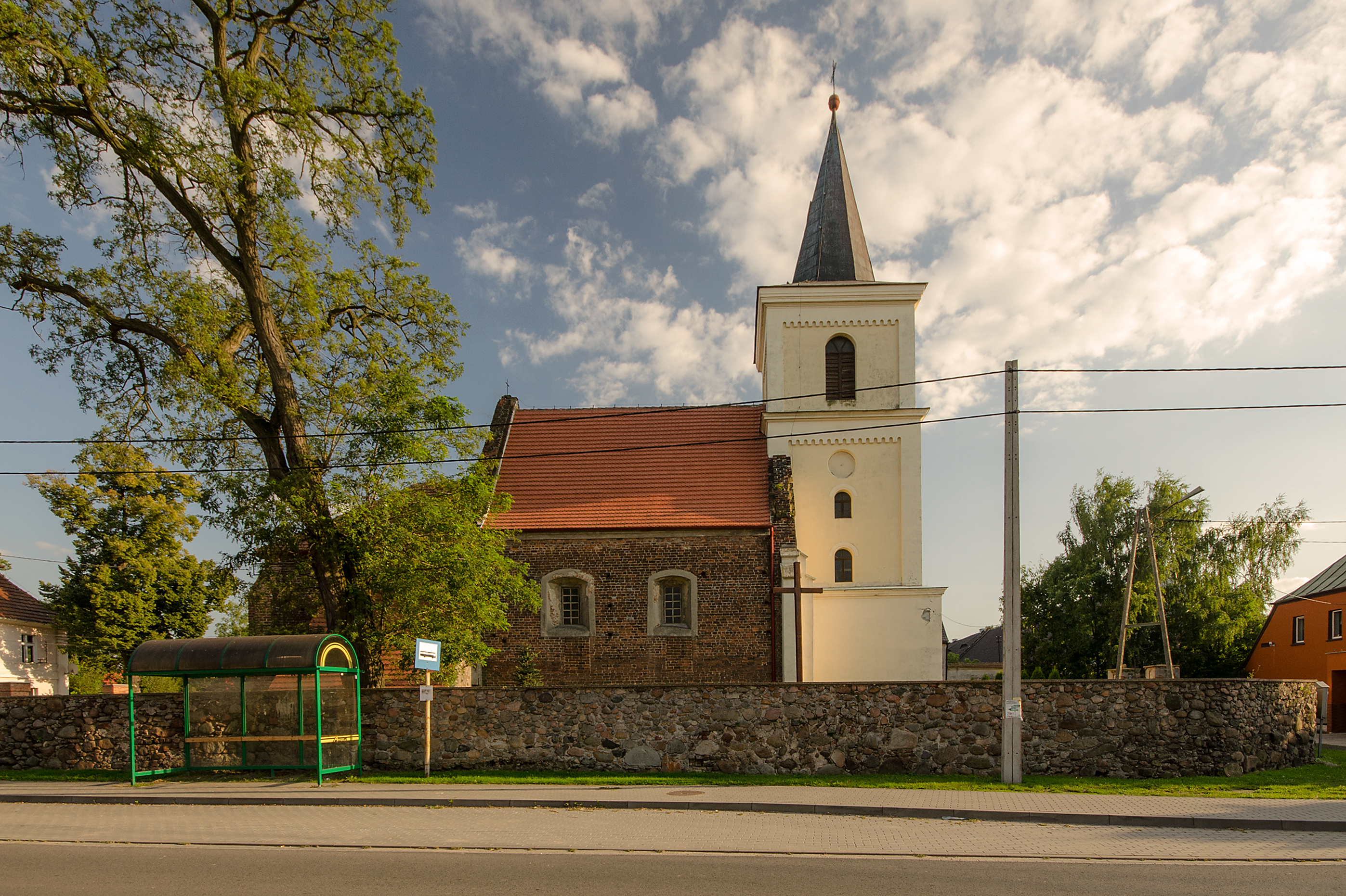 Jankowice Wielkie, kościół fil. p.w. Wniebowzięcia NMP, pocz. XIV, 1843